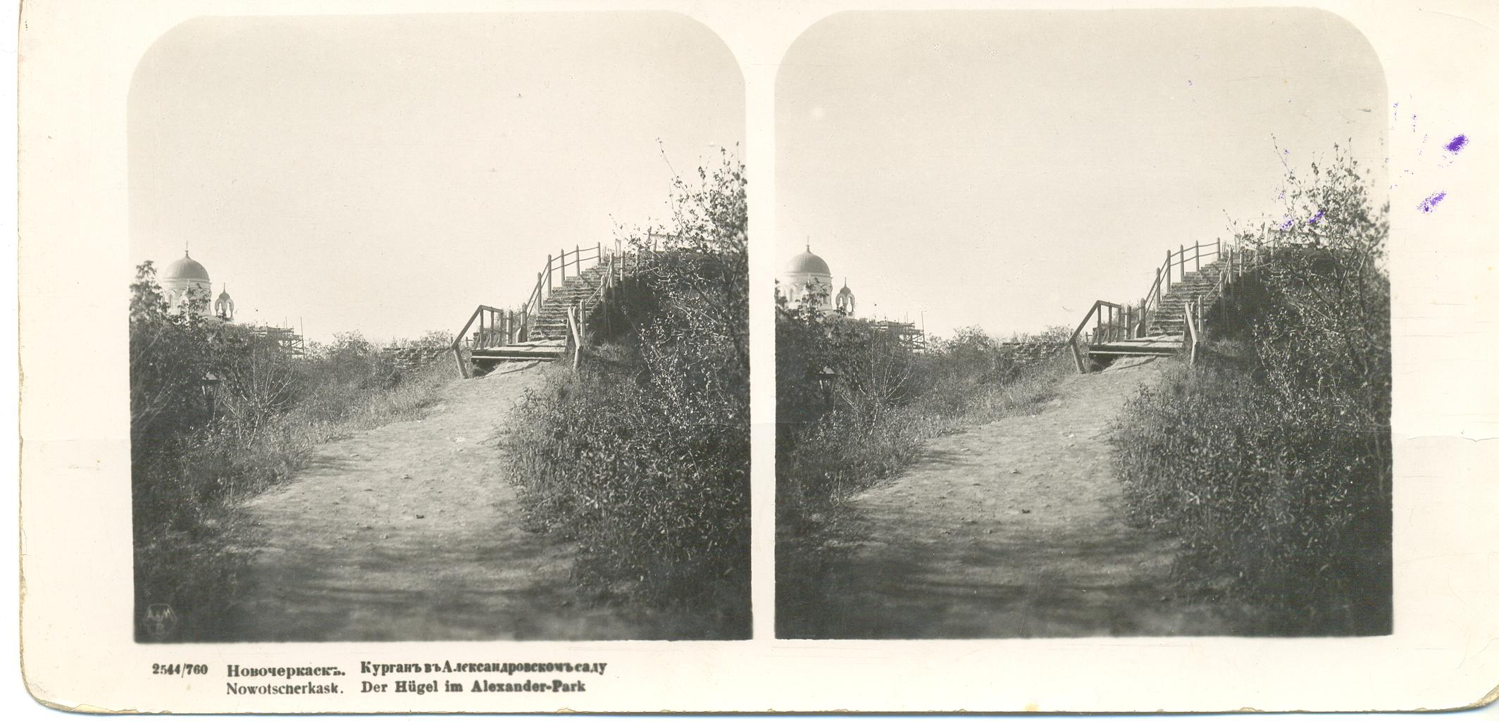 Новочеркасск стерео фотографии с видами города